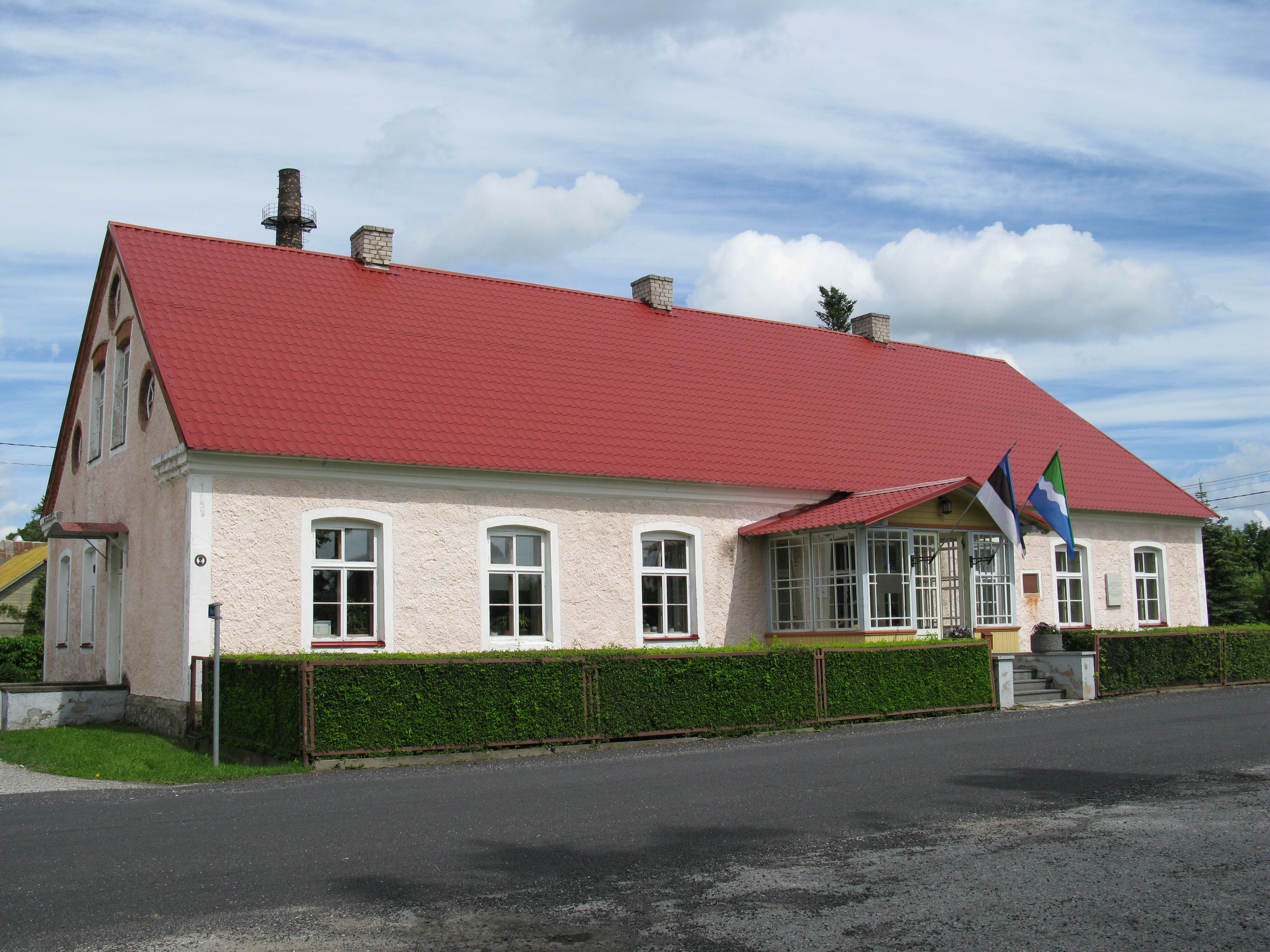 1893 ehitatud Ambla vallamaja